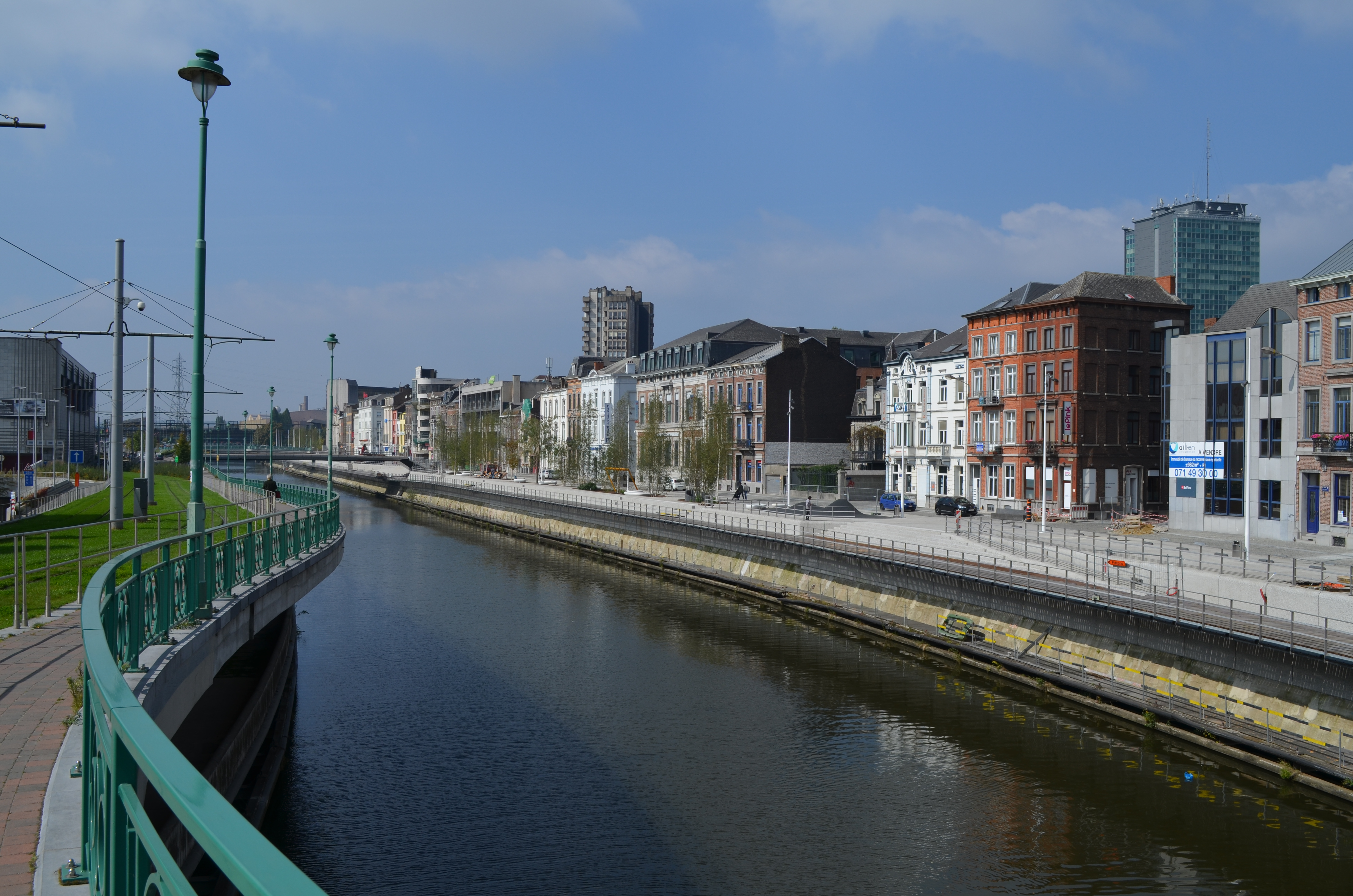 Charleroi (Belgique) - quai de Brabant et la Sambre.